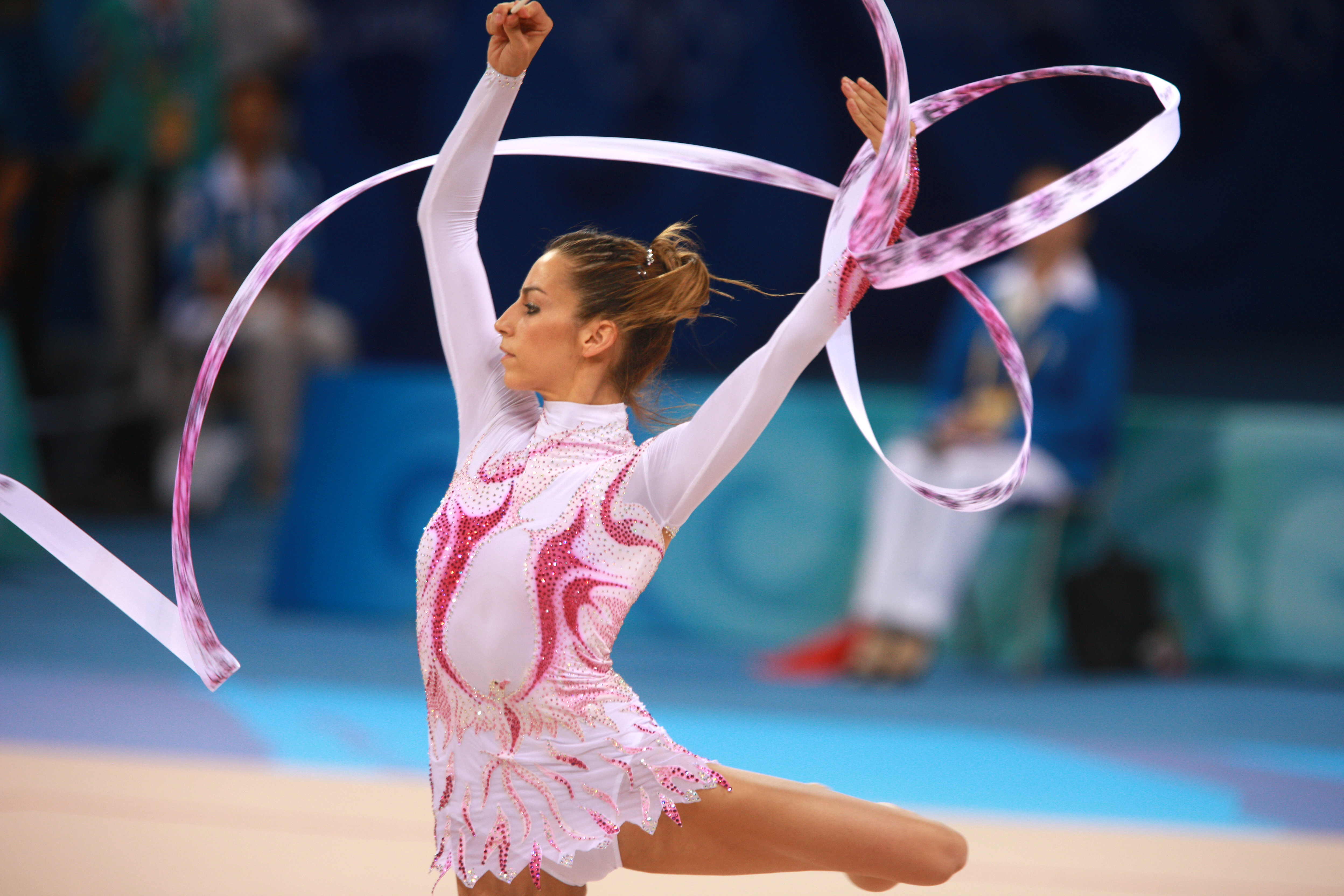 Almudena Cid en los Juegos Olímpicos de Pekín 2008.